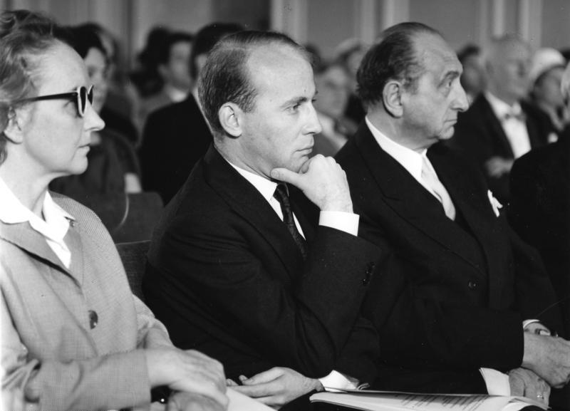 7.6.1960 Köln Schloss Brühl Eröffnung der Internationalen Meisterkurse der Staatl. Hochschule für Musik Mitte: Hans Werner Henze, Neapel